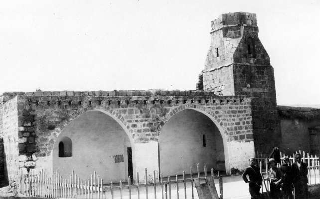 המסגד ביבנה (ג'אמעת אל כניסה) 20-3-1928 - חיים ברגר